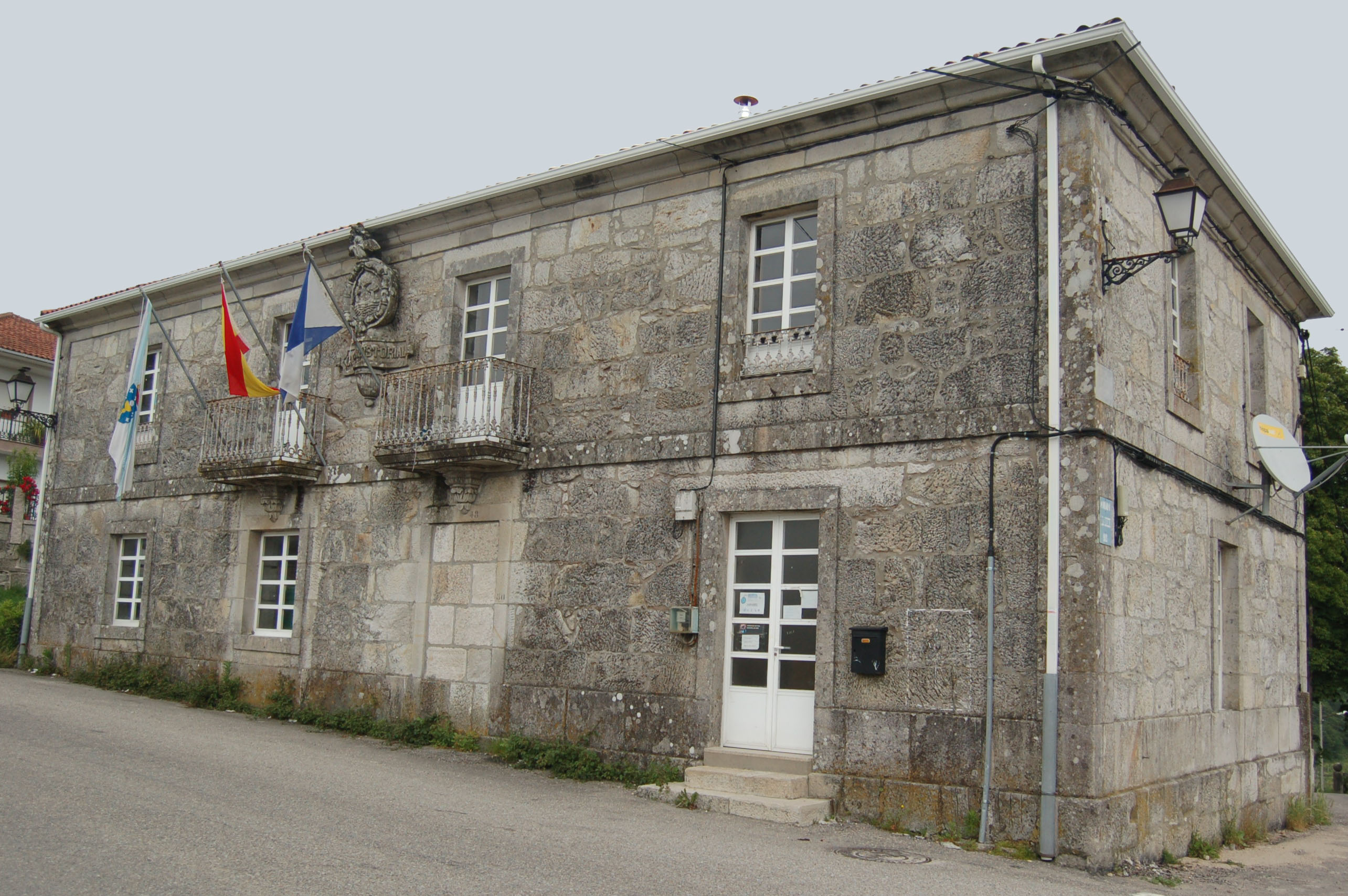 Casa consistorial do concello de Xeve